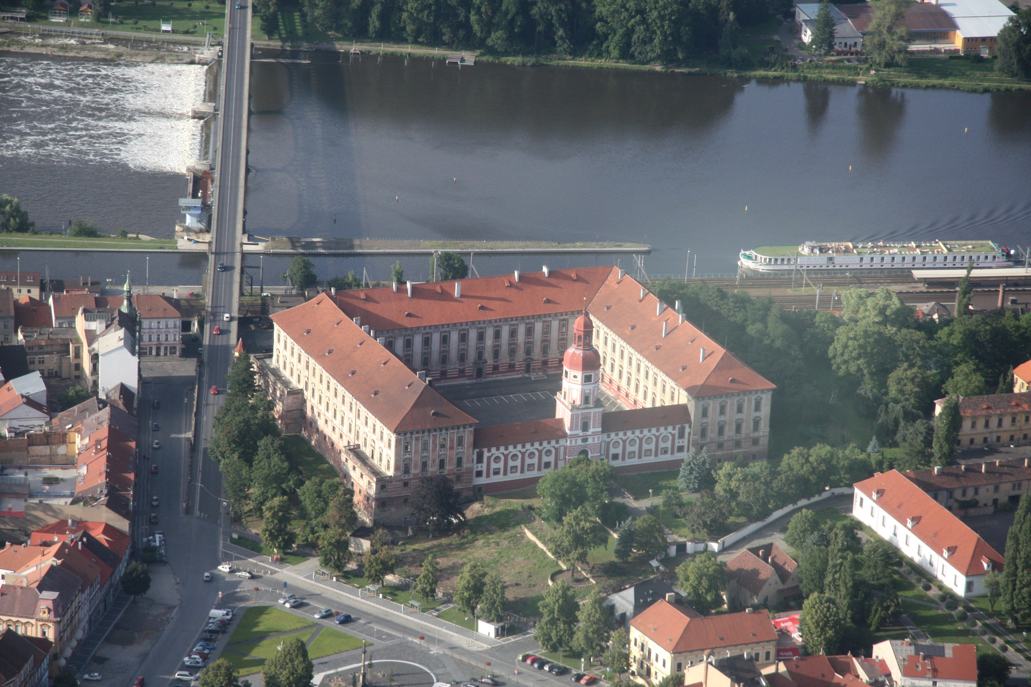 zámek v Roudnici nad Labem letecky